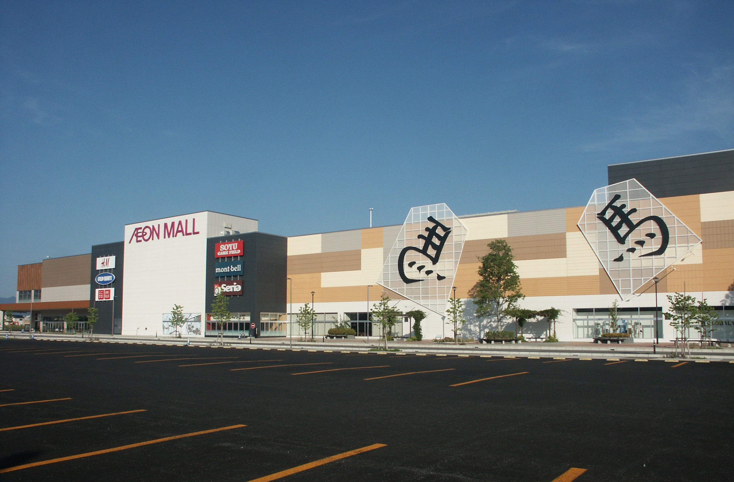 イオンモール天童（建物東側から撮影）